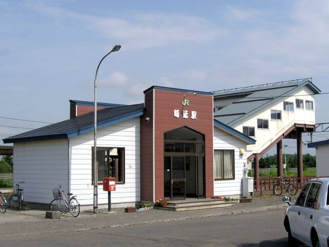 Minenobu Station in Hakodate Line, Japan